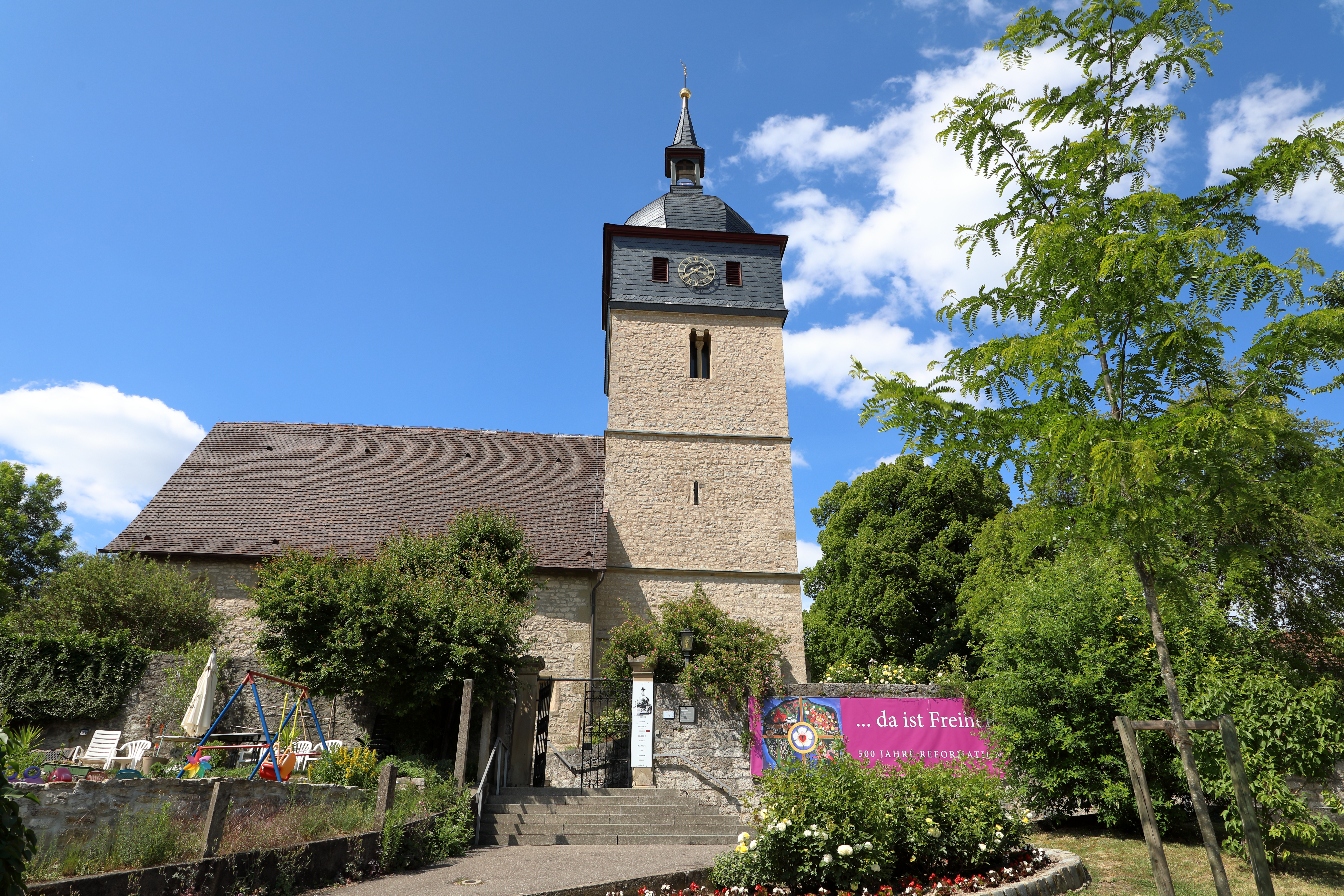 Die Evangelische Pfarrkirche (ehem. St. Nikolaus) im Weikersheimer Ortsteil Schäftersheim. Eine Chorturmkirche mit spätromanischem Turm.